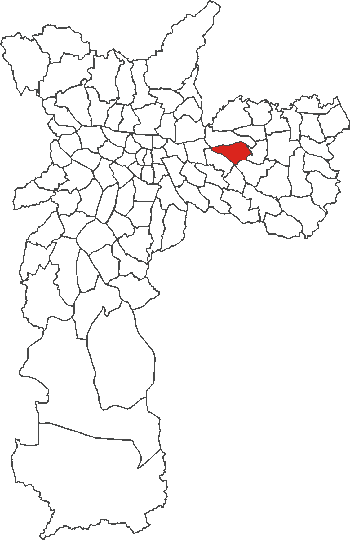 Localização do distrito de Vila Matilde no município de São Paulo.